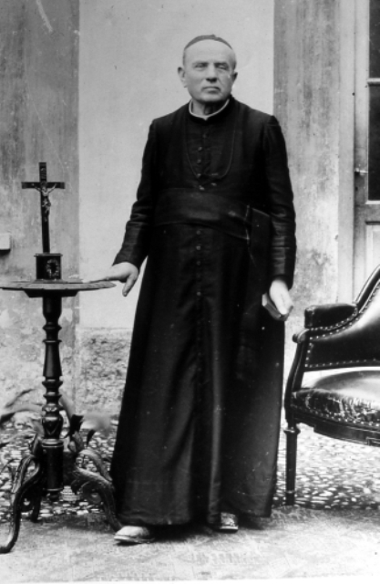 Don Luigi Guanella a Como in una foto del 1912